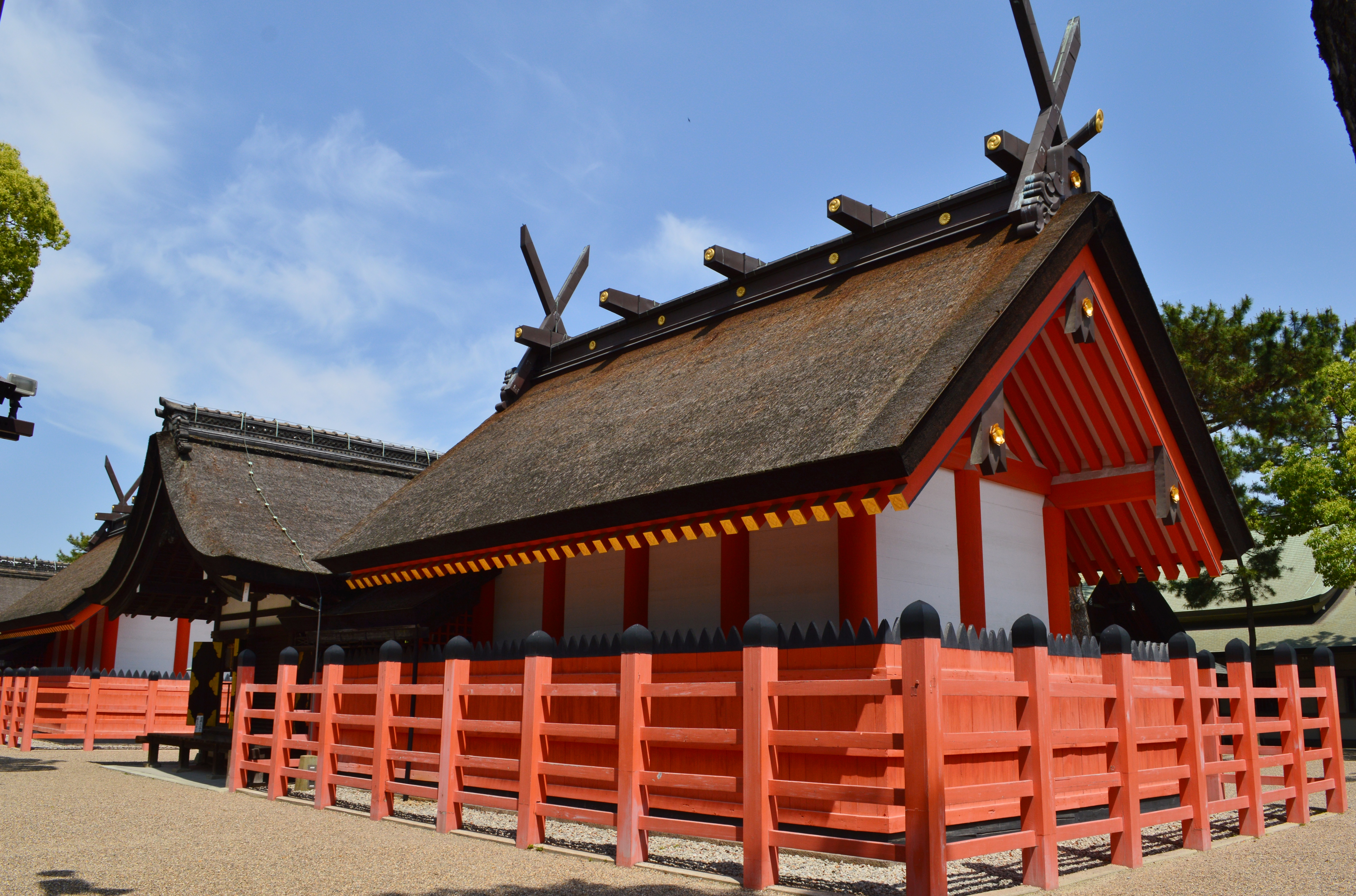 住吉大社 第二本宮本殿